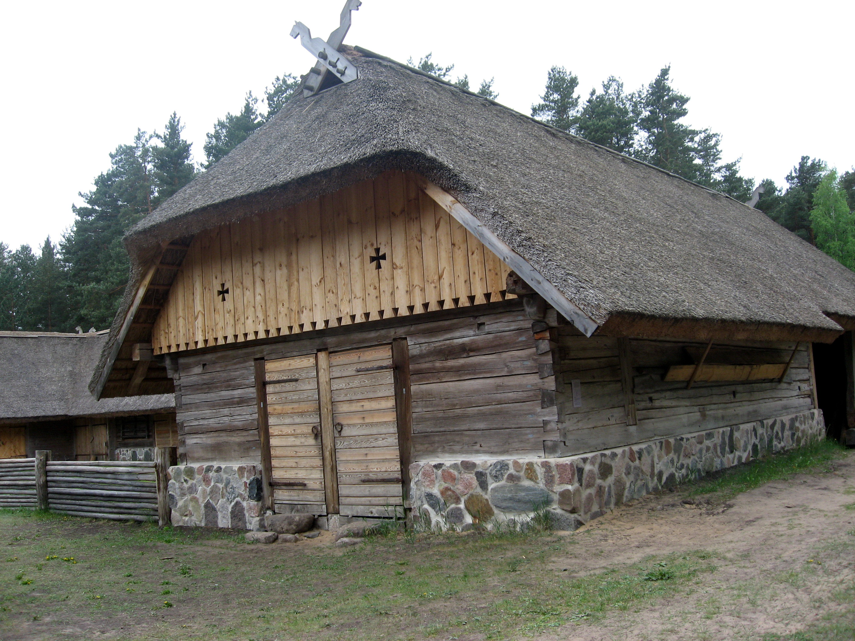 Lotyšské etnografické muzeum v přírodě: Horseshoe-shaped cattle-yard, oblast Kurzeme, Rucava, Vecķērves, postavena v pozdním 19. století